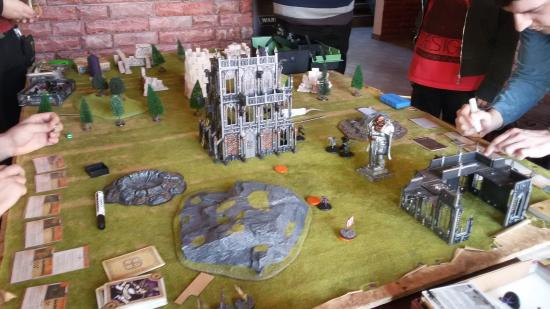 Δείγμα εδάφους που απεικονίζει πεδίο μάχης